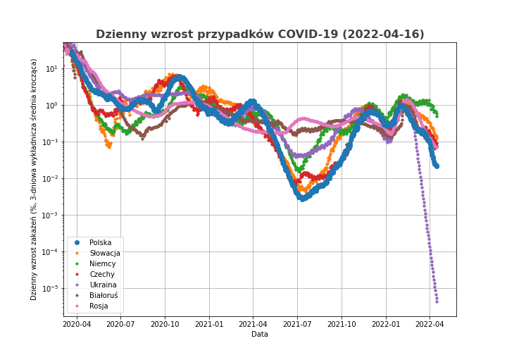 Wykres procentowych wzrostów dziennych zachorowań na COVID19 w Polsce i krajach sąsiednich.